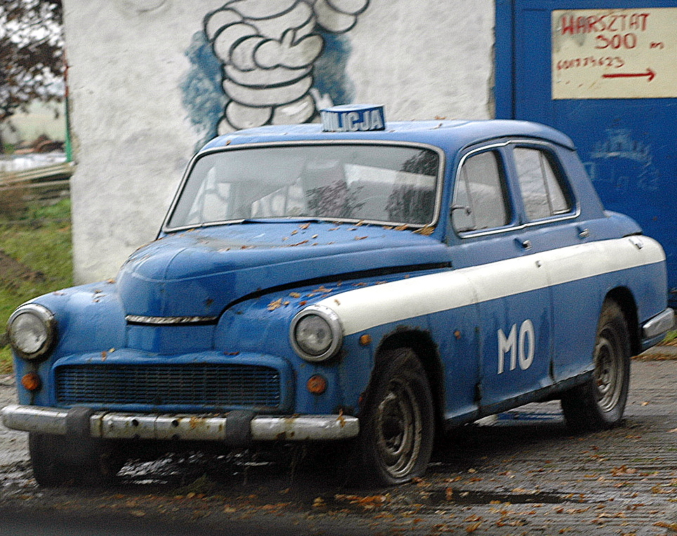 FSO Warszawa w malowaniu Milicji Obywatelskiej w Dygowie.